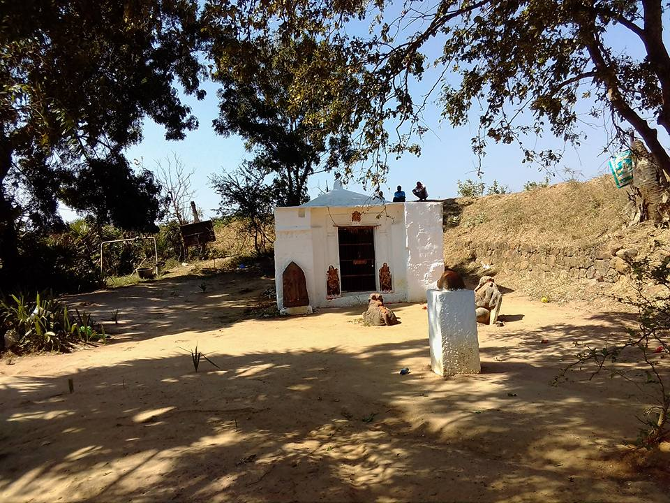 మఠంగూడెం పురాతన శివాలయం